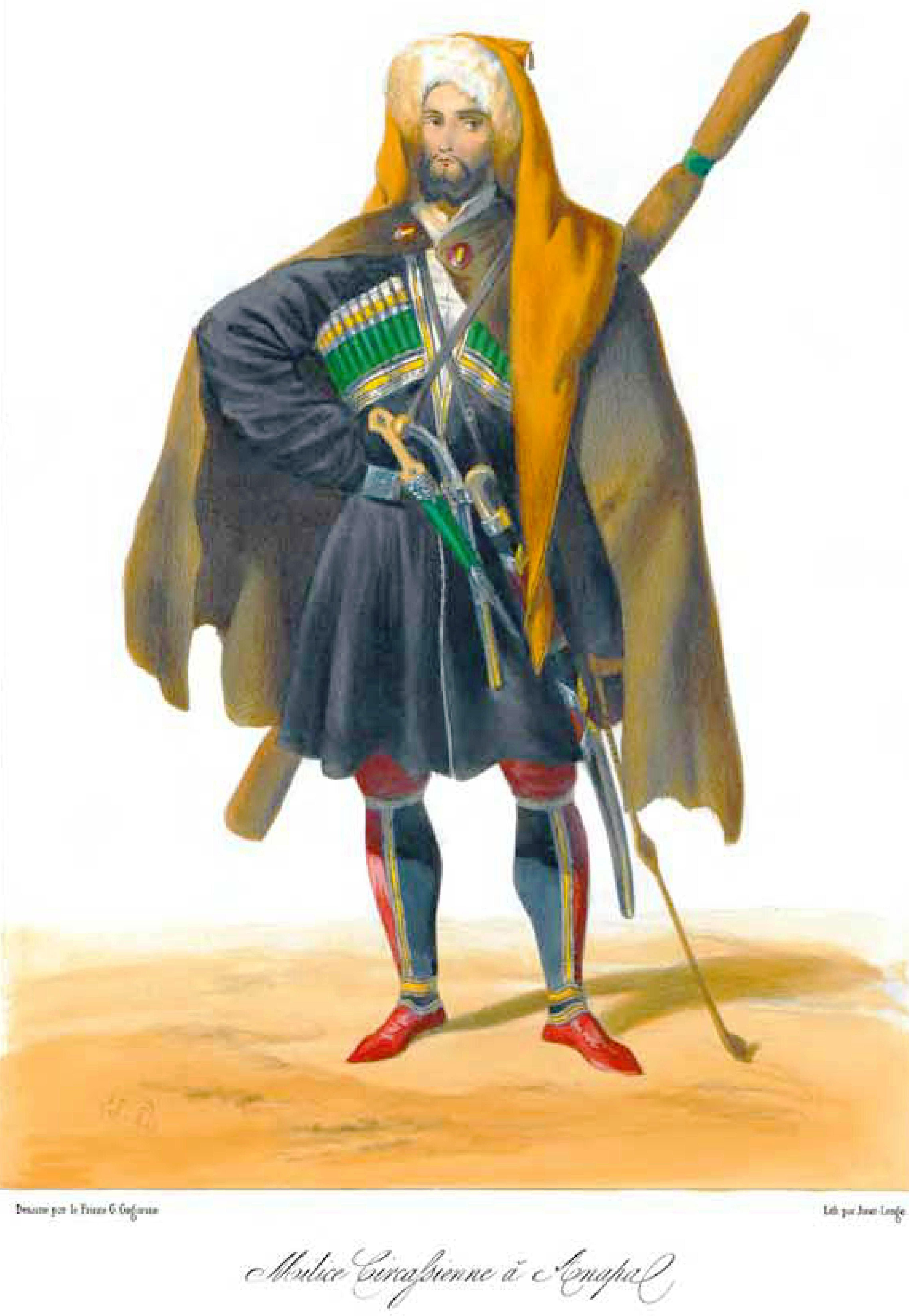 Scènes, paysages, moeurs et costumes du Caucase dessinés d'aprés nature par le prince G. Gagarine.